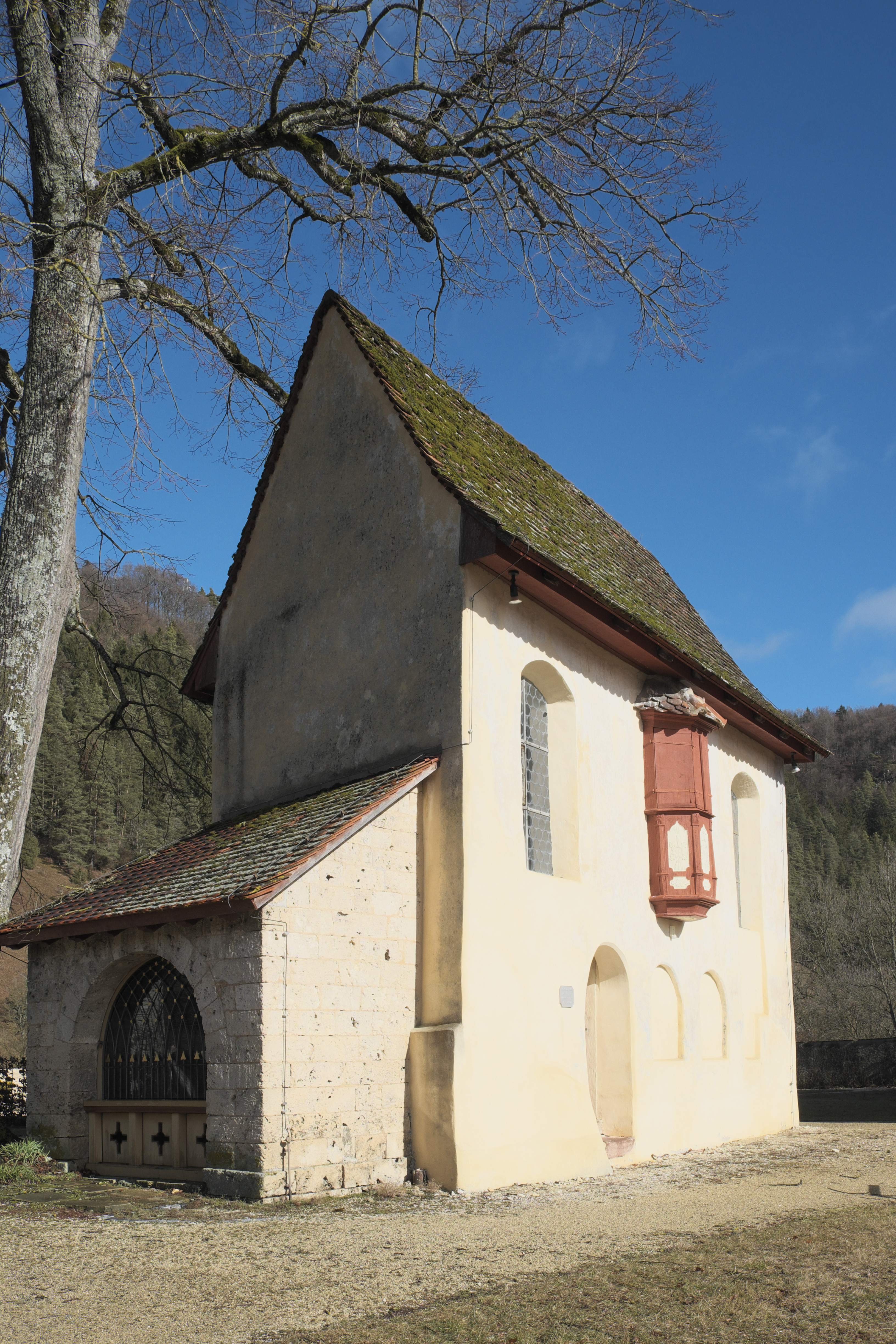 Veitskapelle, ehemaliges Beinhaus, in Mühlheim an der Donau im Landkreis Tuttlingen (Baden-Württemberg/Deutschland)